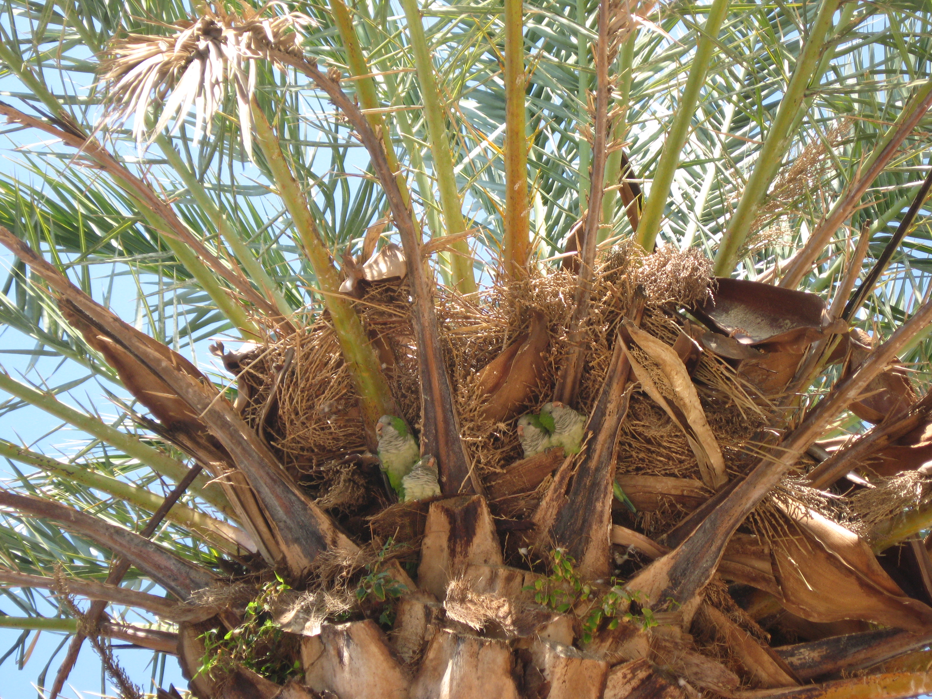 Sittiche in einer Dattelpalme in Roses (Spanien/Katalonien) Datum: 22.09.2010 Urheber: Michael Pfeiffer alias Benutzer:Gordito1869 Quelle: privates Fotoarchiv des Urhebers